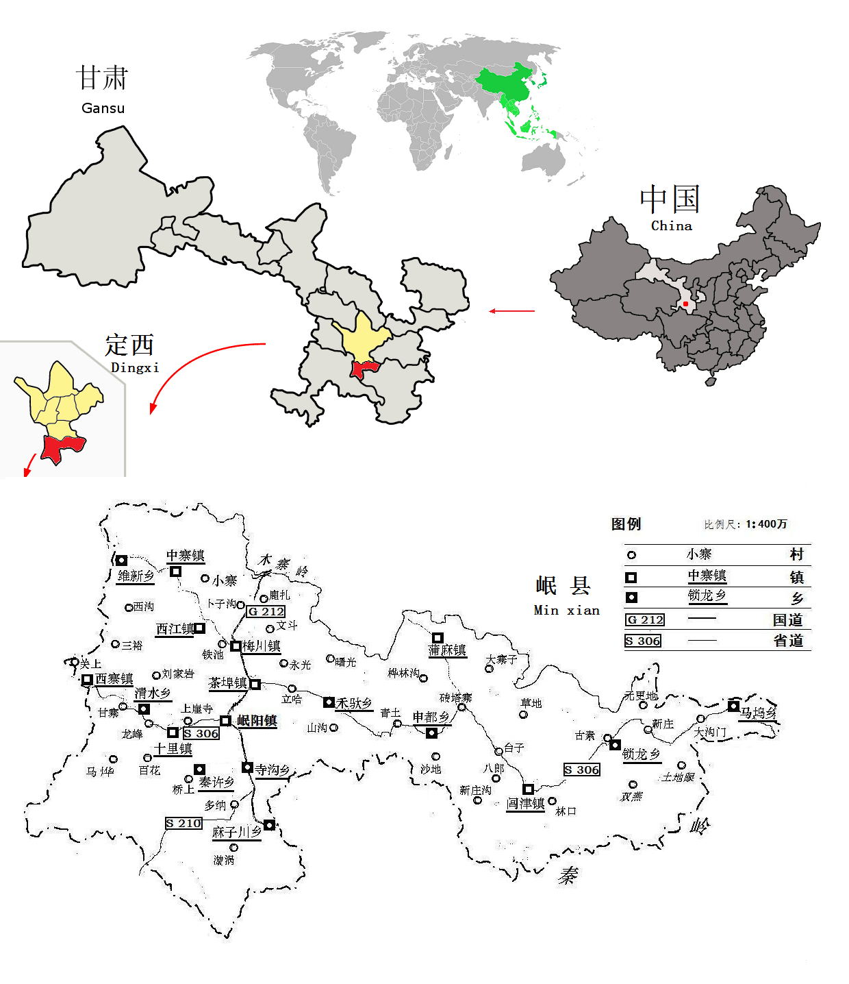 岷县